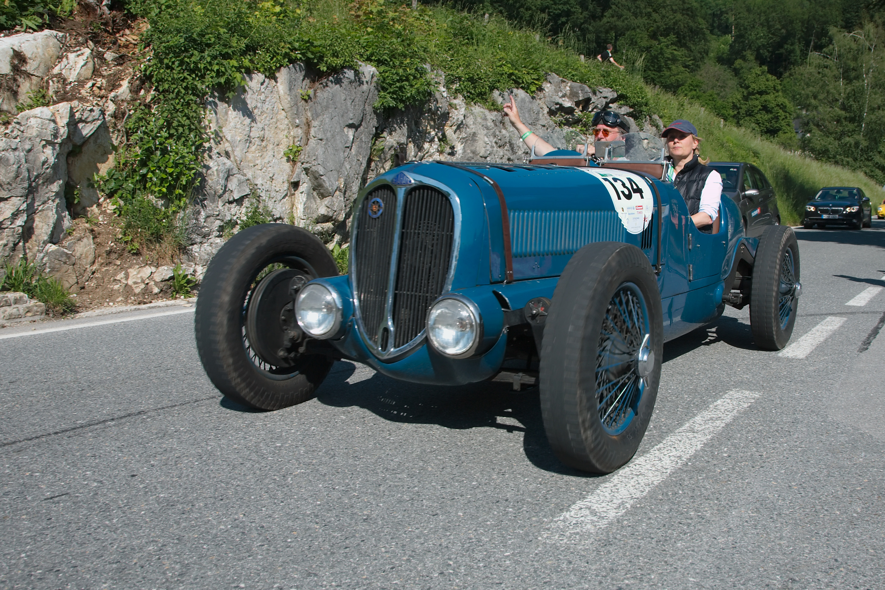 Delahaye Type 135 S at Geisbergrennen 2009